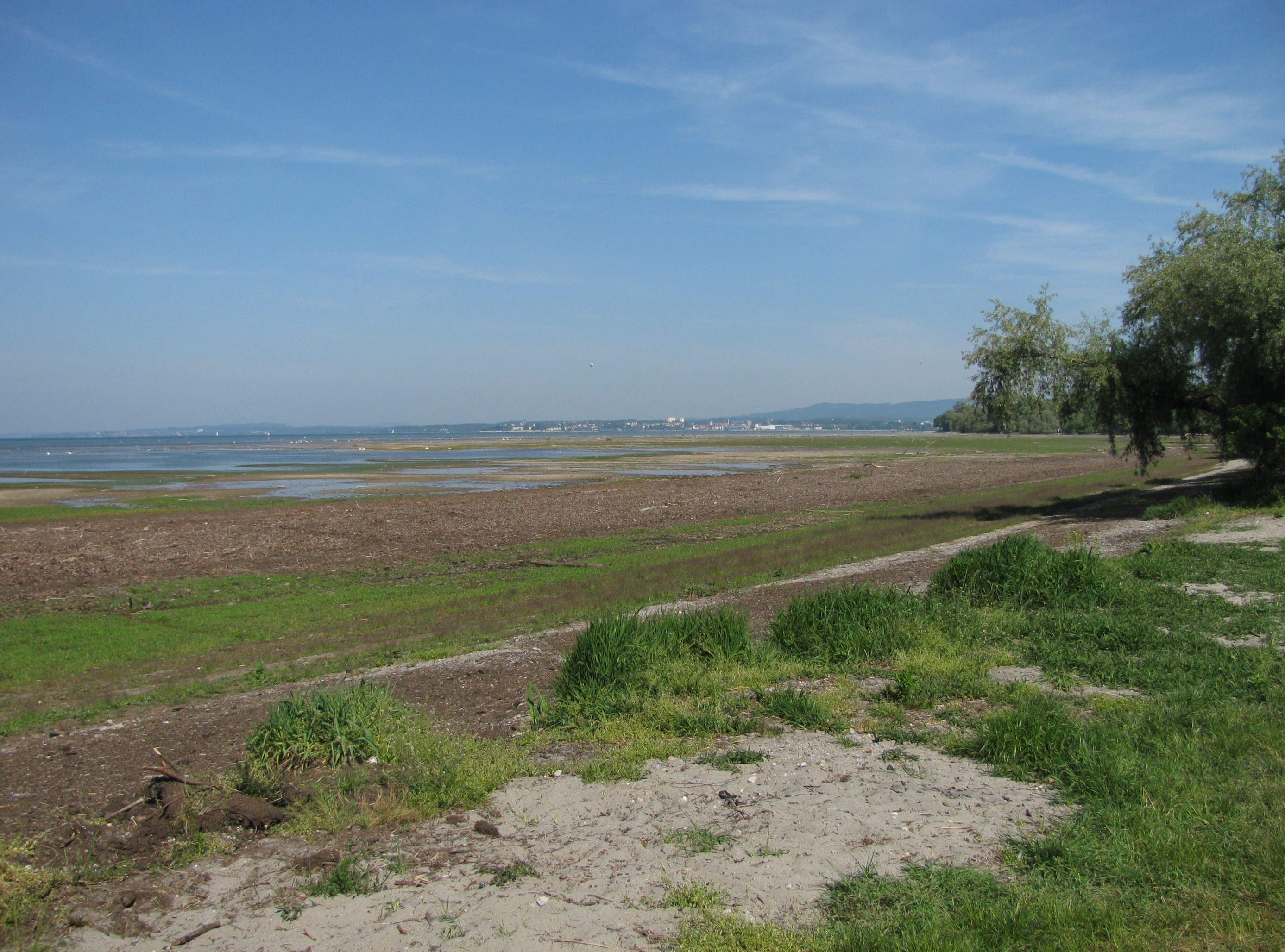 Deutschland - Baden-Württemberg - Bodenseekreis - Langenargen: Bodenseeufer zwischen DLRG-Heim und Schussenmündung